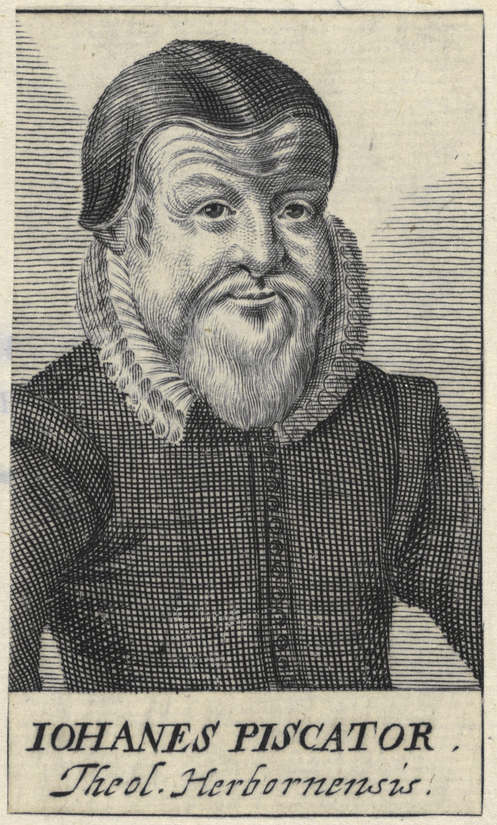 Bildnis des Iohannes Piscator, von Johann Azelt, Stecher; Kupferstich; Berlin, Staatsbibliothek zu Berlin - Preußischer Kulturbesitz, Handschriftenabteilung, Inventar-Nr. Portr. Slg / Slg Hansen / Lutherische Theologen / Bd. 17 / Nr. 37; Teil von: Freher, Paul, Theatrum Virorum Eruditione Clarorum : In quo Vitæ & Scriptae … Repræsentantur …, Serie, 1688, Nürnberg